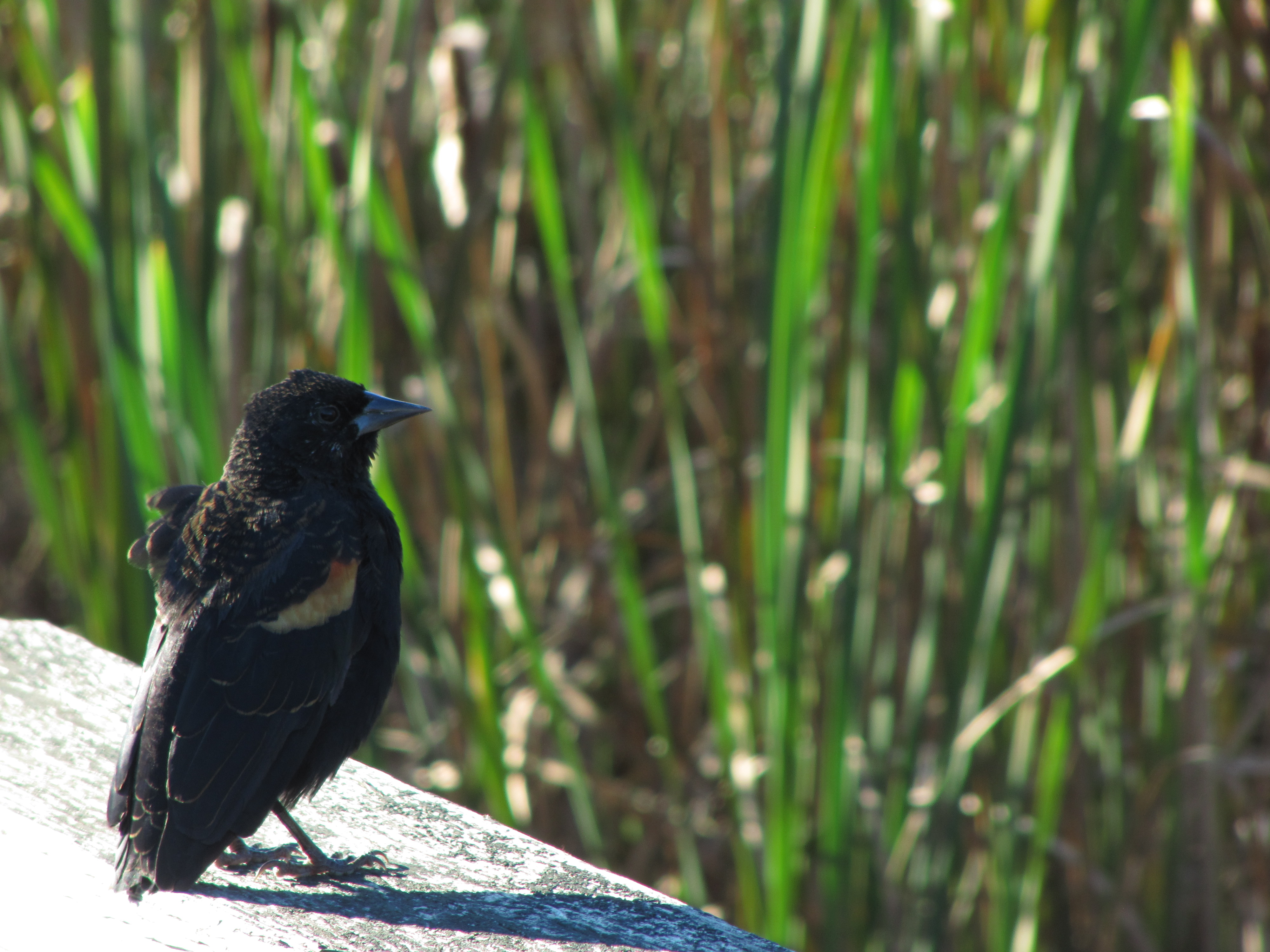 Photo prise au Centre d'Interprétation de la nature du lac Boivin de Granby (Québec). Oiseau à l'oeuvre dans le marécage.